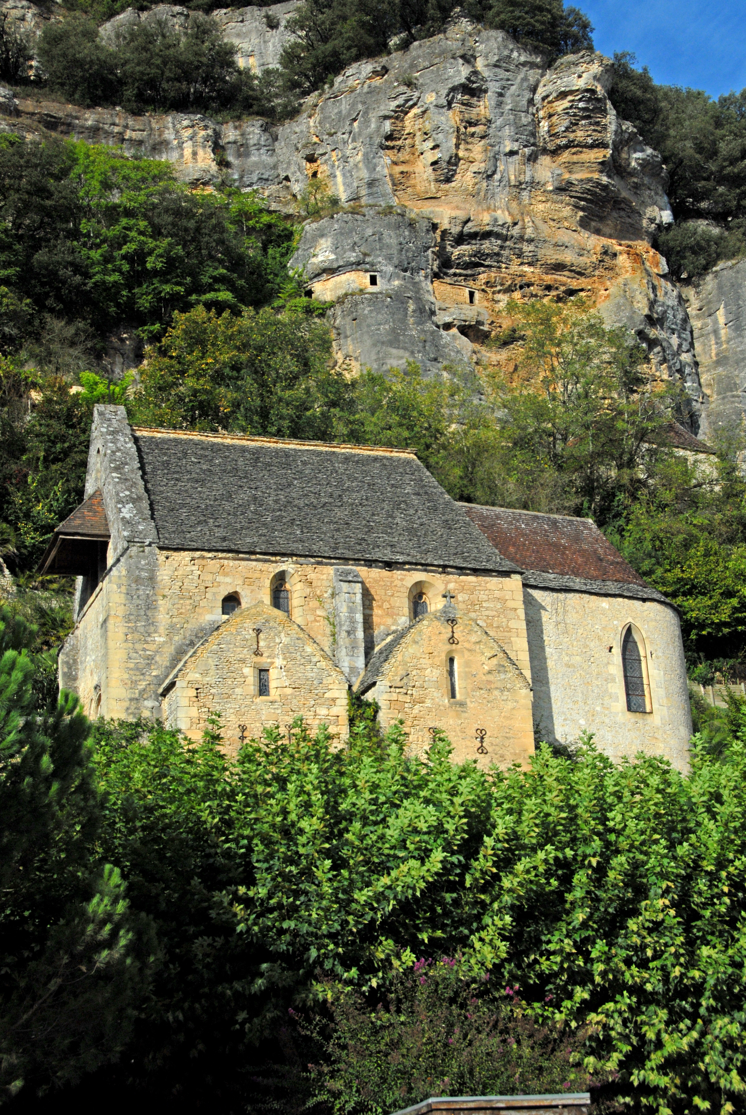 La Roque-Gageac, Kirche von Süden